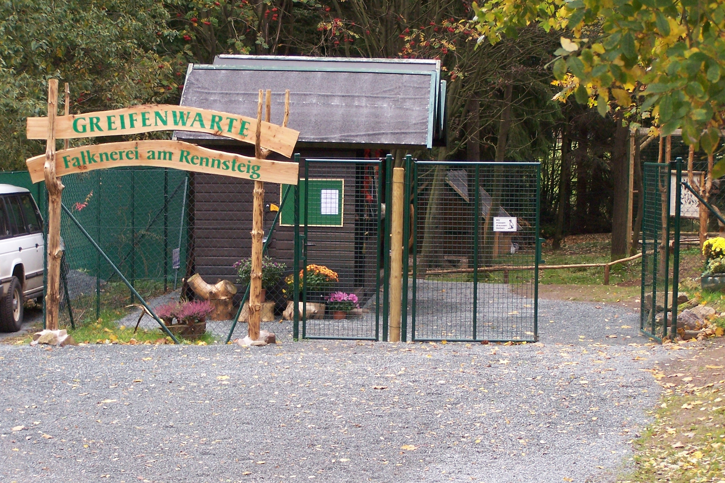 Am Eingang zur Greifenwarte am Rennsteig bei Winterstein, OT Ruhlaer Skihütte.